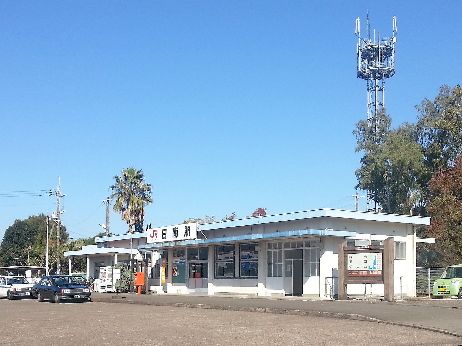 JR 日南駅